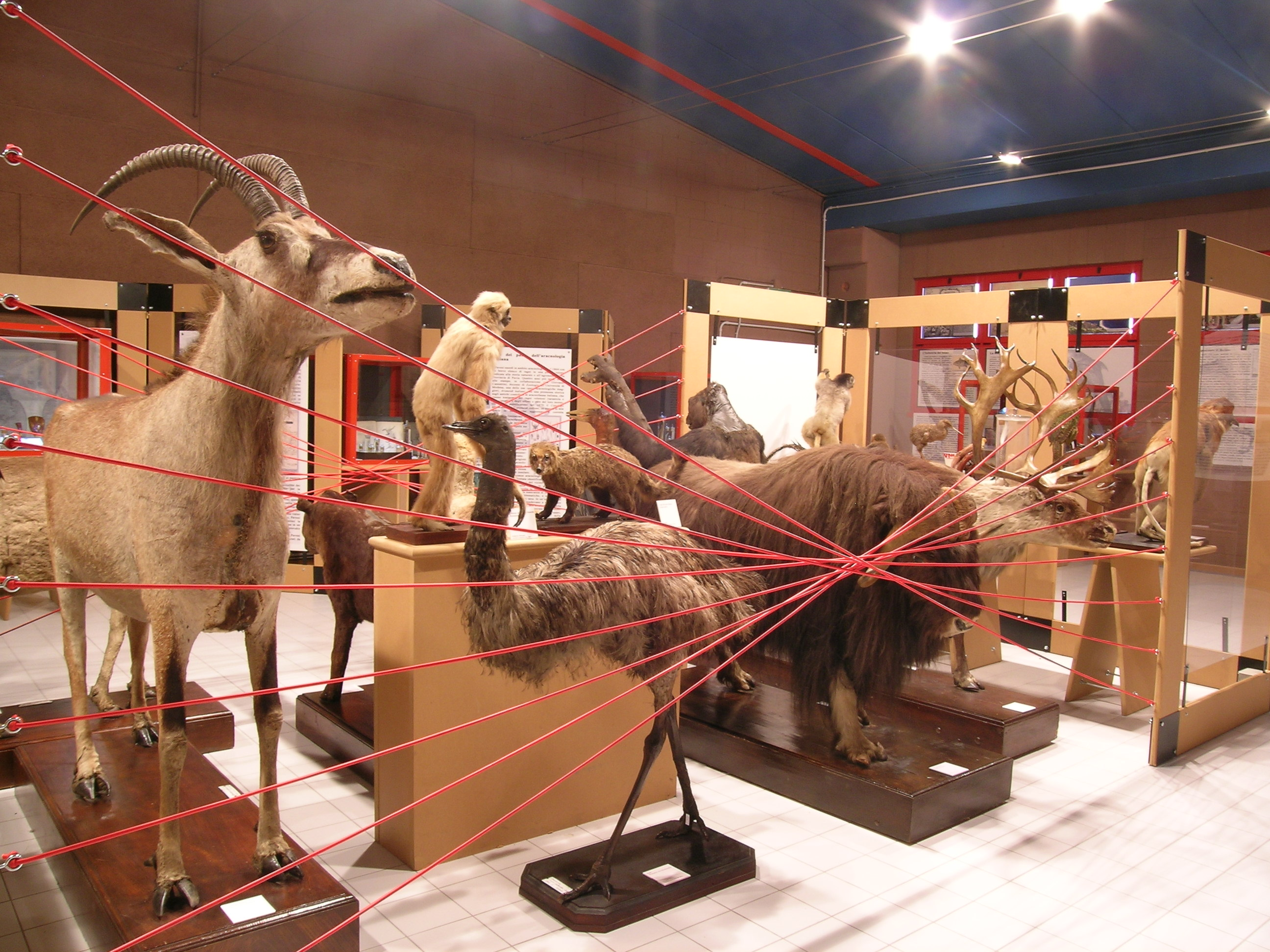 Foto della mostra del 2007 dedicata a Pietro Paveso, Museo di storia naturale dell'Università di Pavia